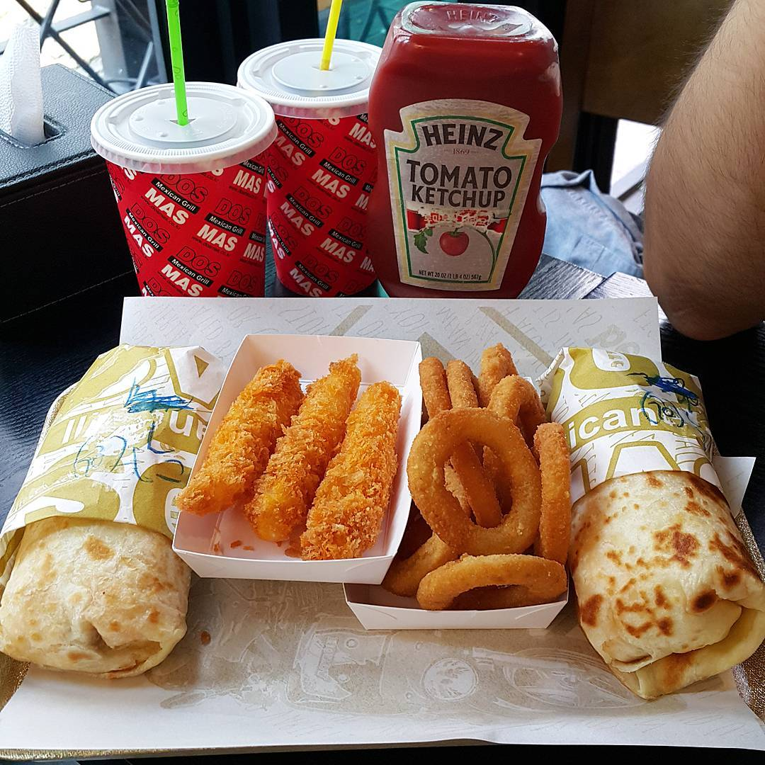 도스마스 음료, 튀김